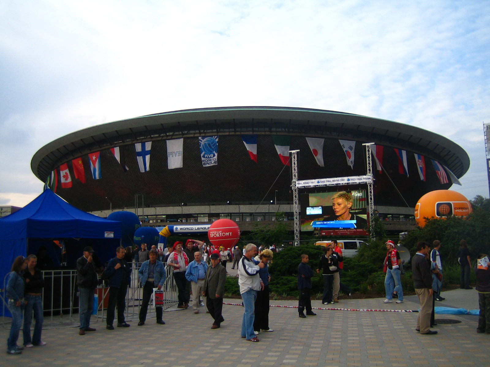 Spodek podczas finałów Ligi Światowej 2007